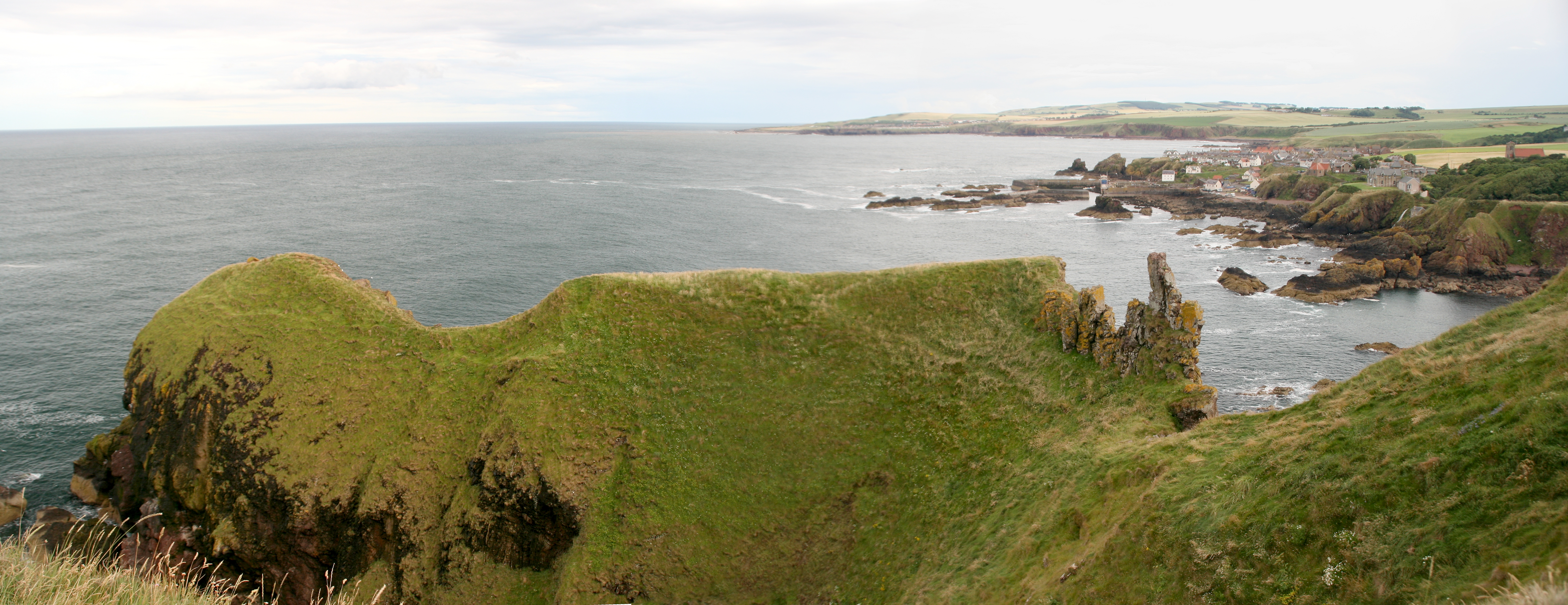 La población de St. Abbs se encuentra en el sur de Escocia, costa este.